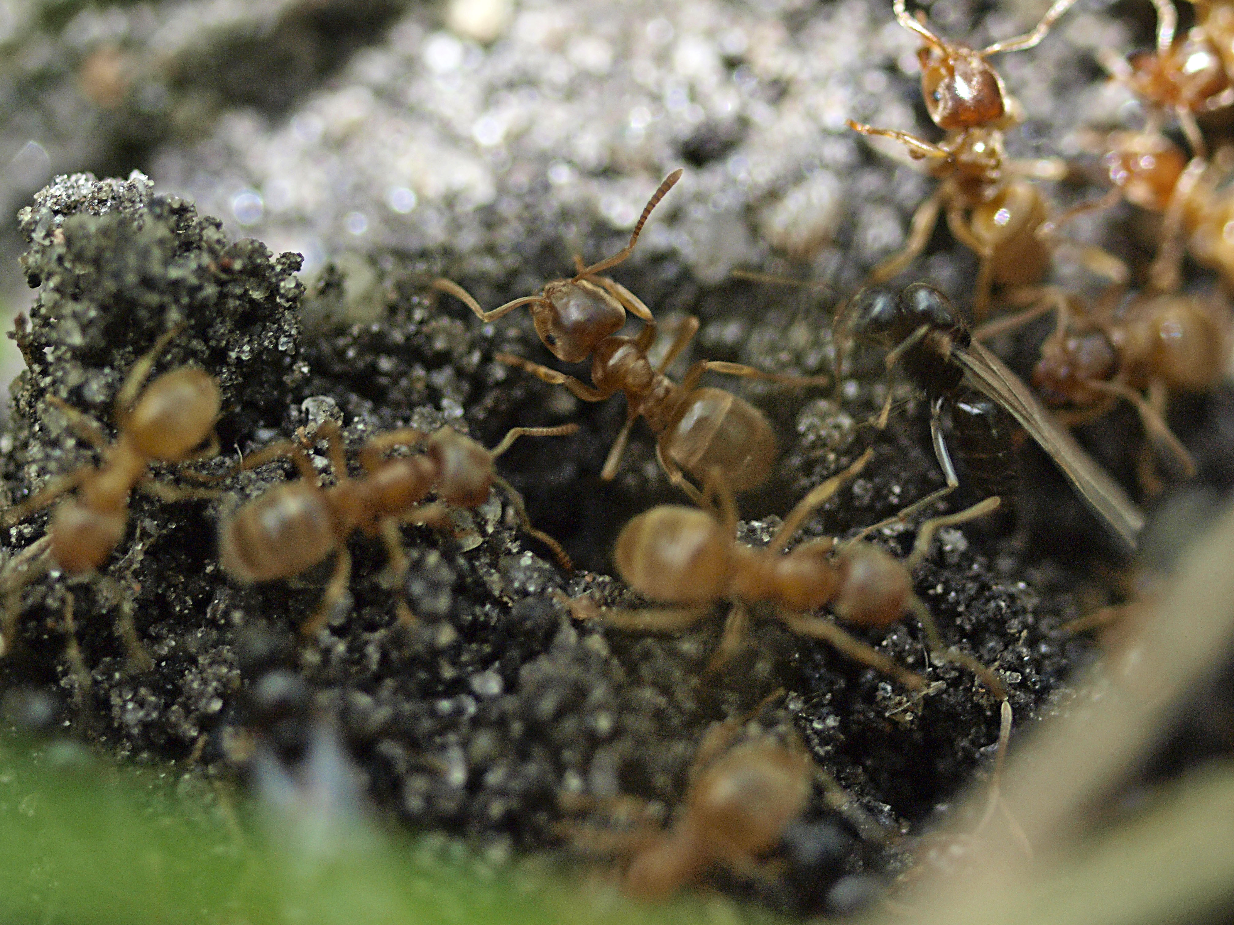 Gul Engmyre